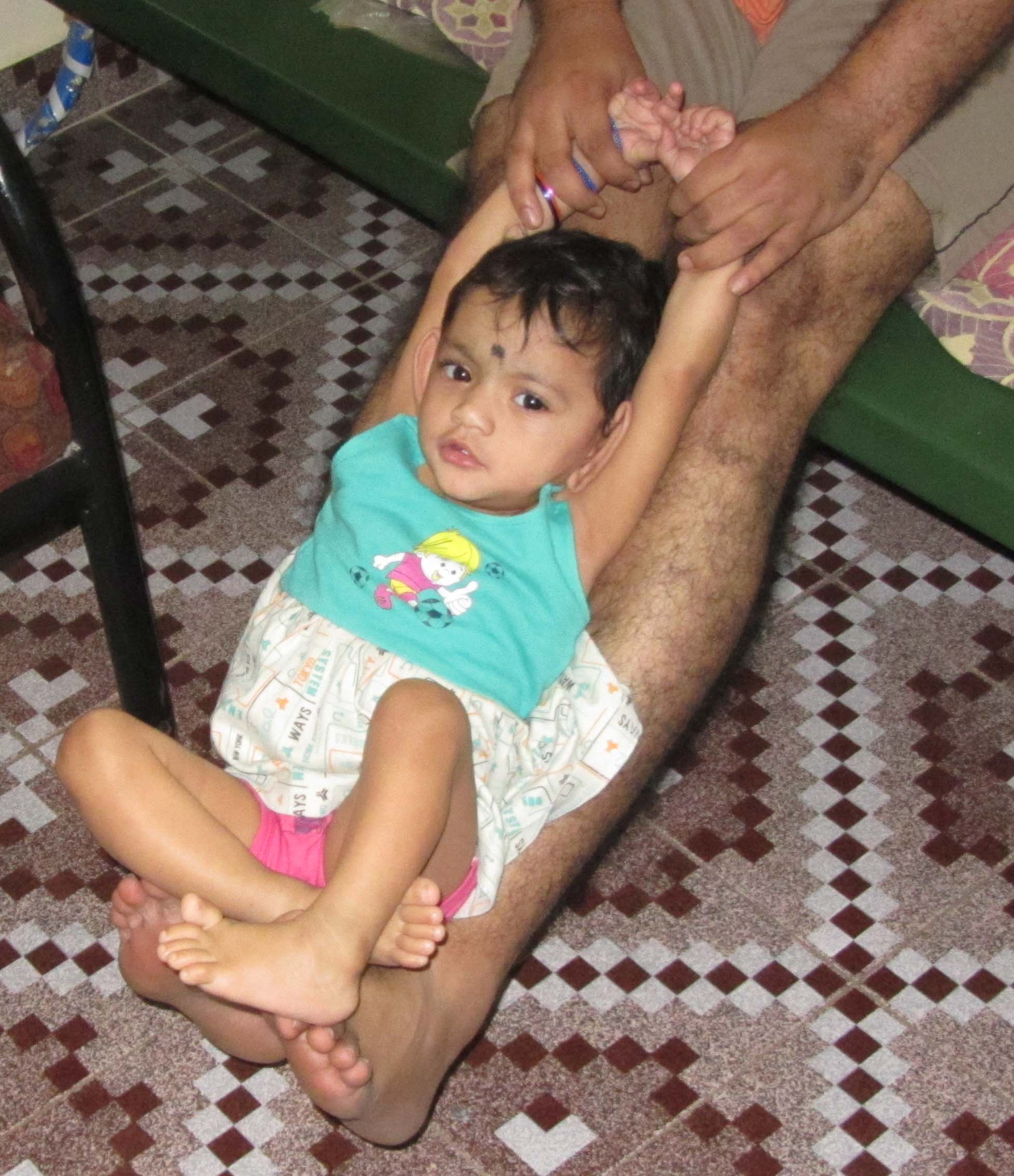 own shot - தென்னைமர விளையாட்டில் குழந்தையைக் காலில் வைத்து ஐலேலம் ஐலகப்பல் என்று சொல்லித் தாலாட்டுதல்